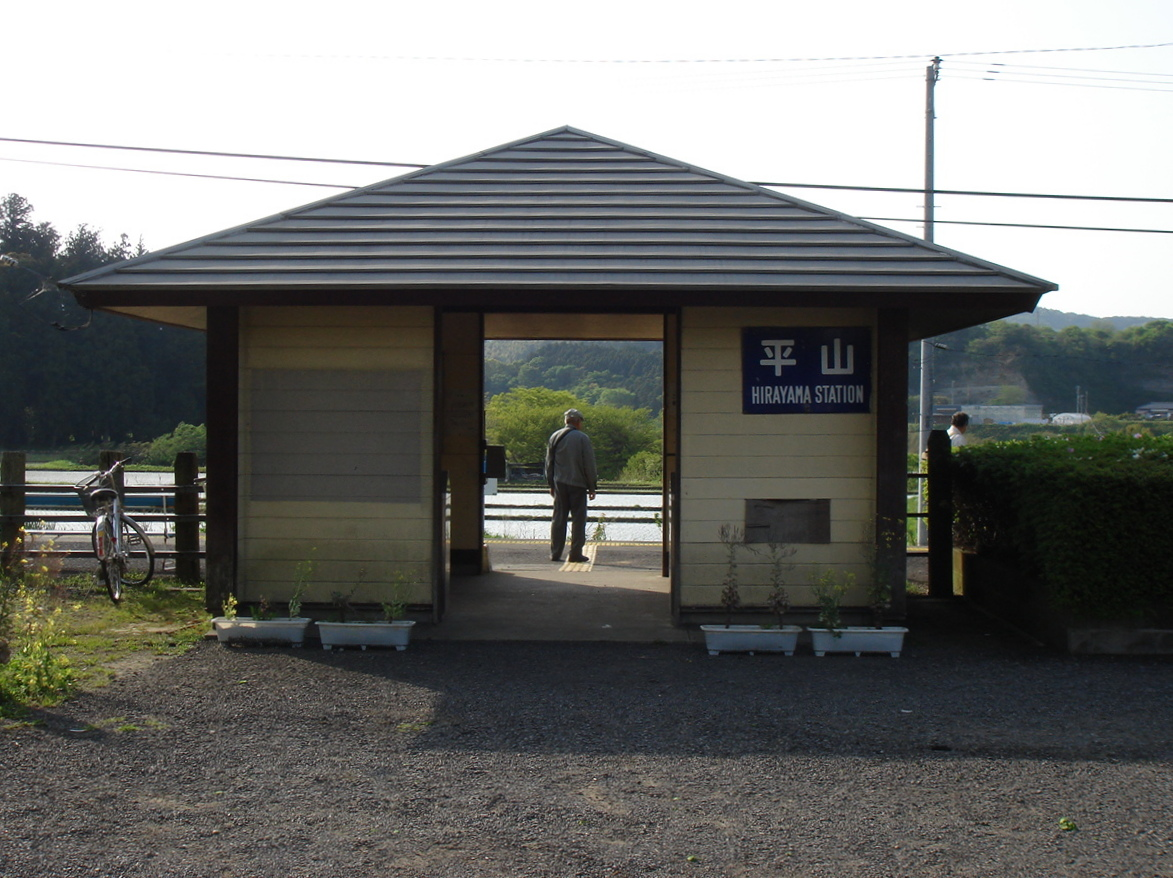 Hirayama Station on the Kururi Line, Kimitsu, Chiba, Japan